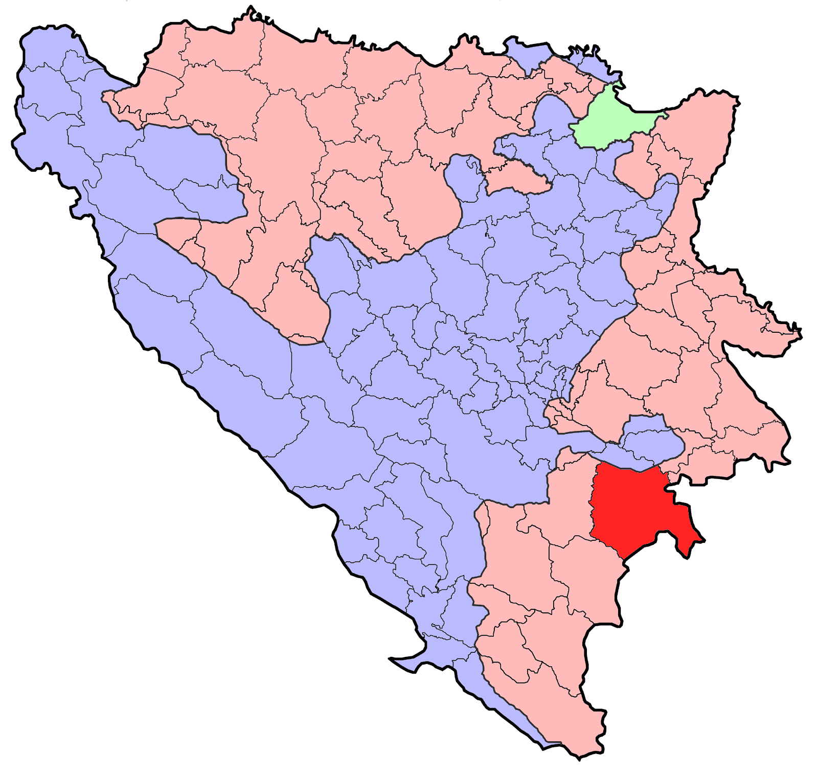 Republika Srpska (BiH) municipality